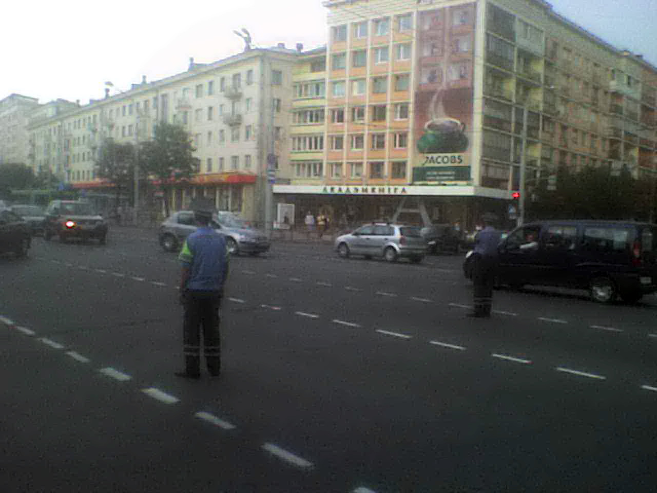 Акция «Стоп-Бензин!» в Минске. Перекрытие сотрудниками ГАИ проспекта Независимости на участке пересечения пр. Независимости - ул. Сурганова. 21 июля.